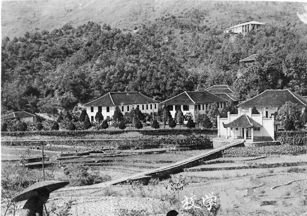 1937年时的南岳圣经学院